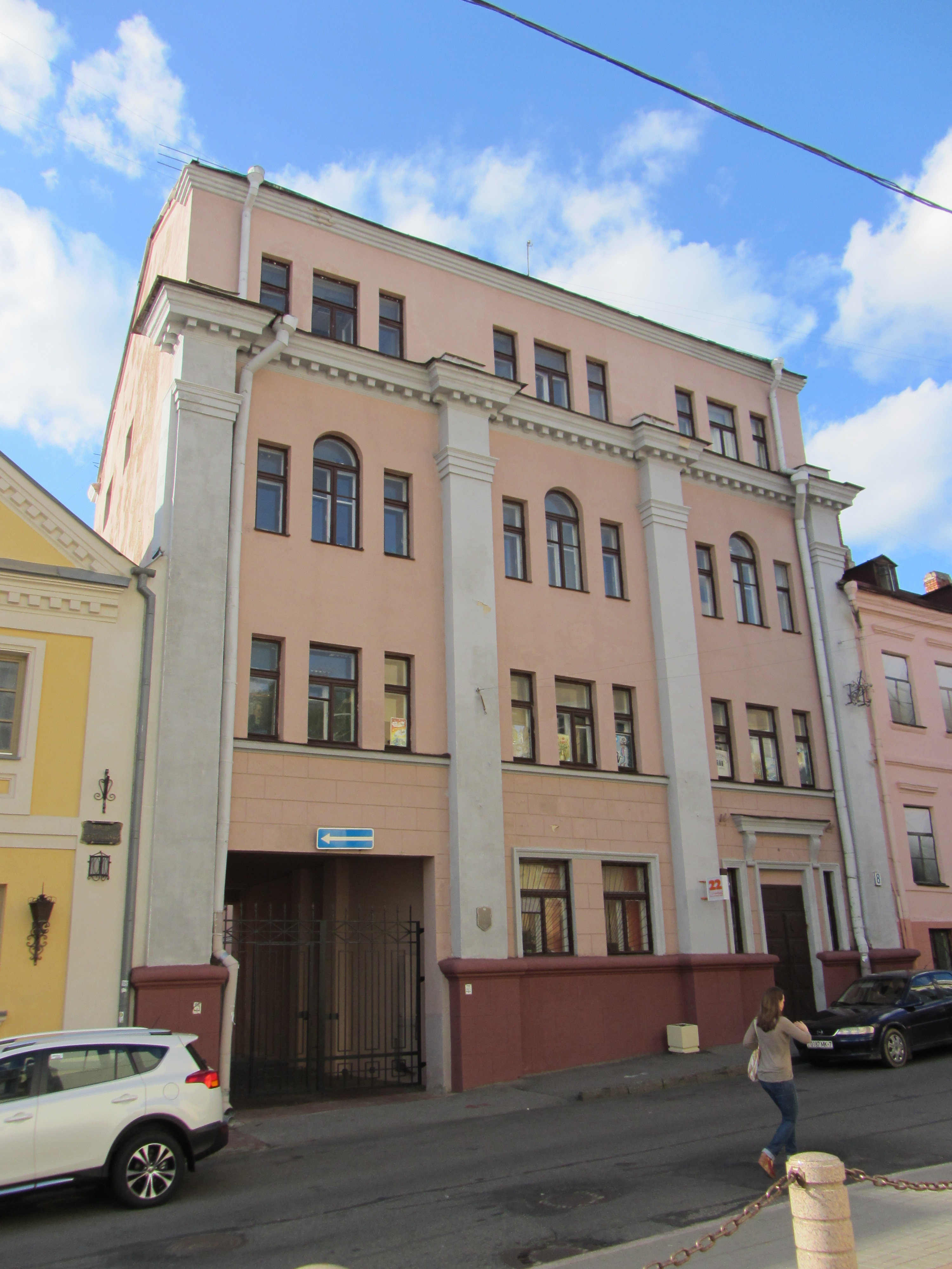 Беларуская (тарашкевіца): Вуліца Рэвалюцыйная, 8